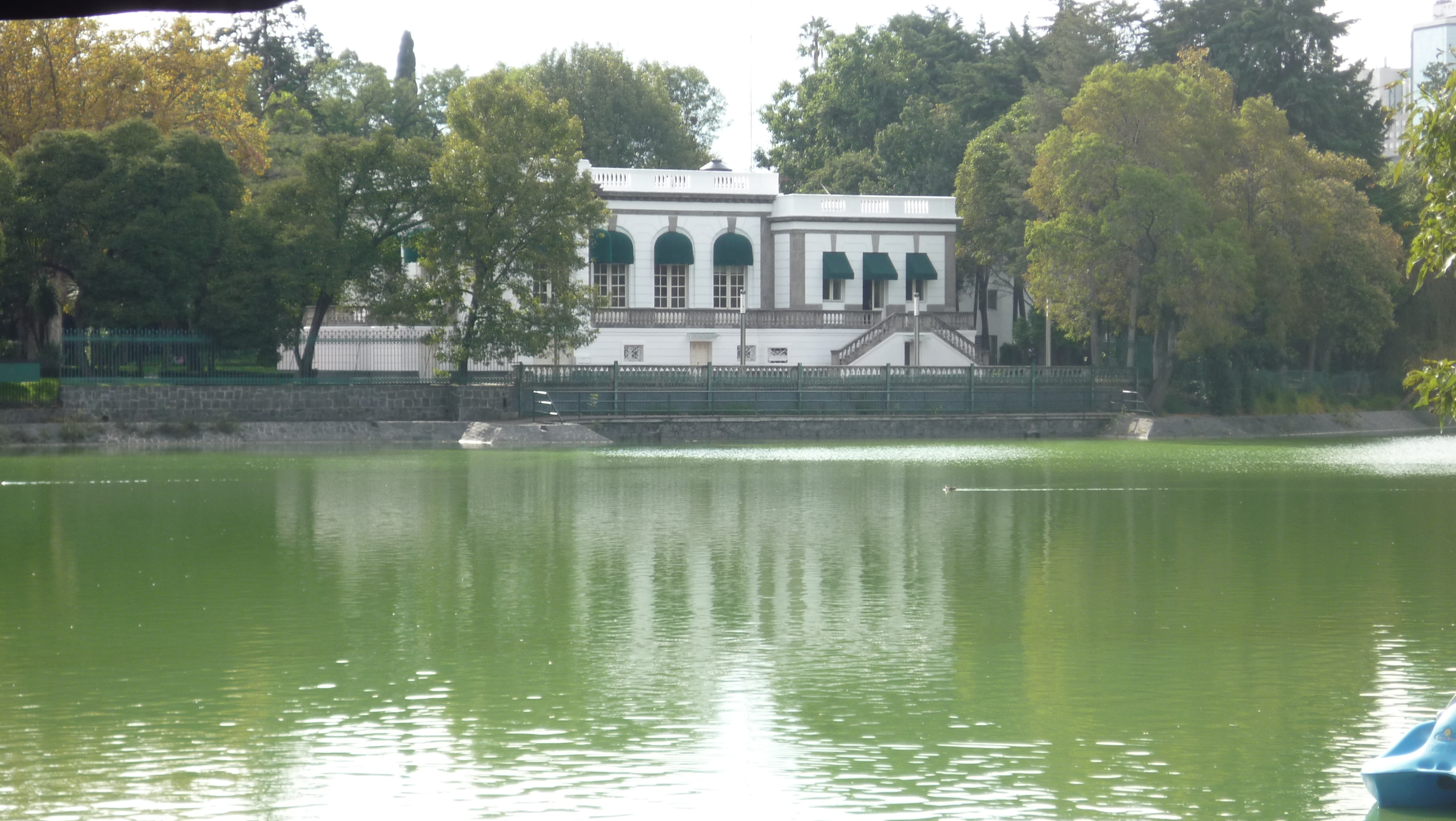 Vista desde el otro lado del Lago